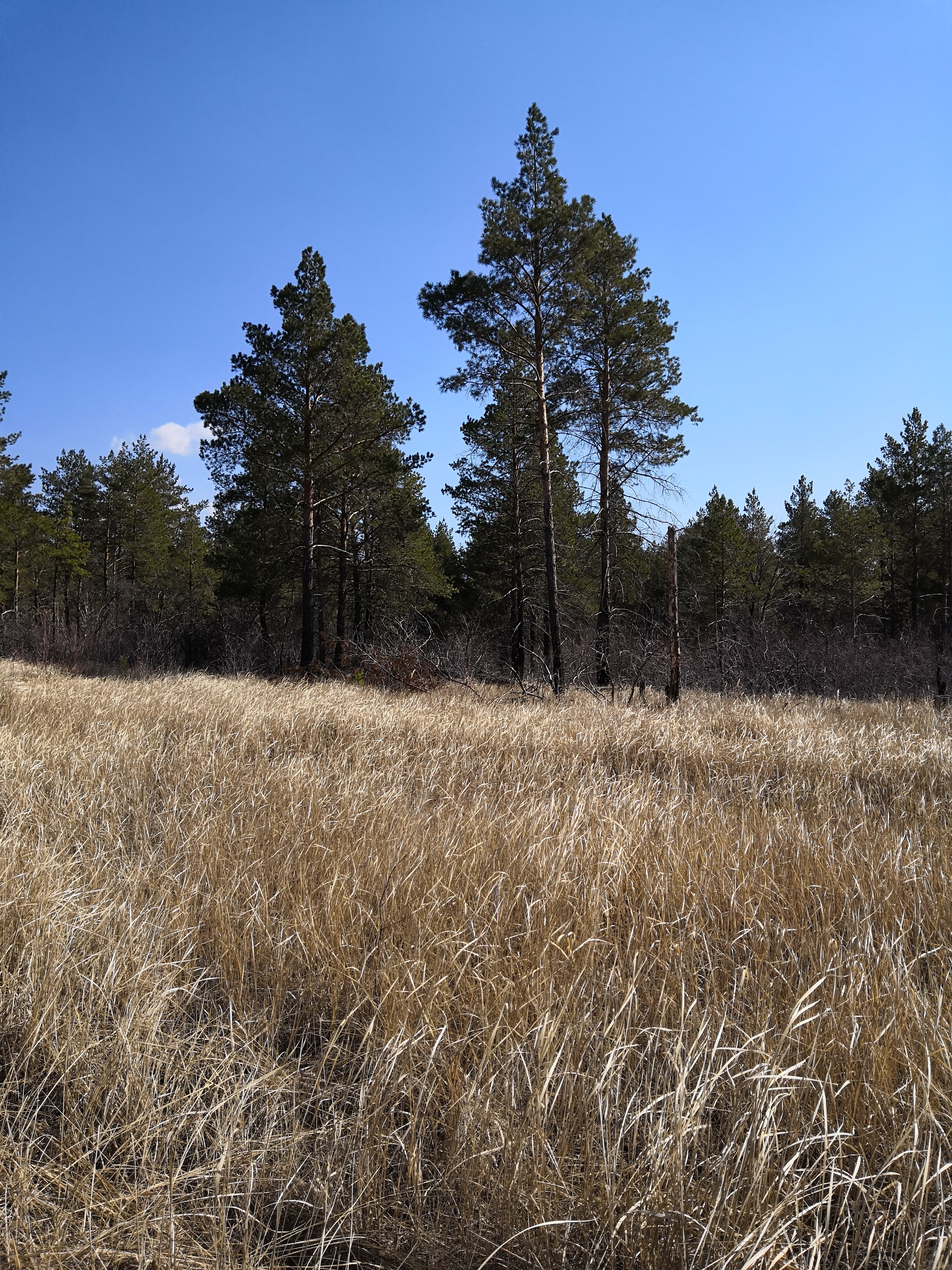 Лес на горе Качкарка весной